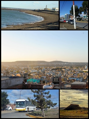 Montaje de Caleta Olivia